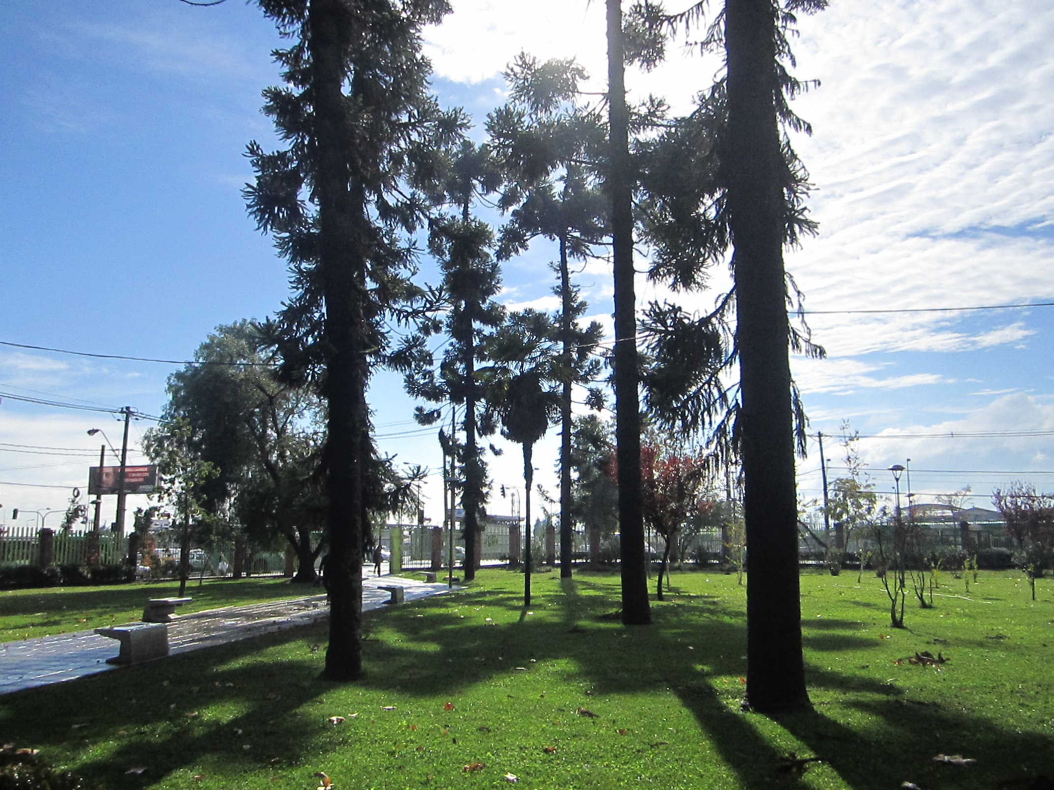 Vista de la Plaza Cívica de la comuna de La Granja, en Santiago de Chile.